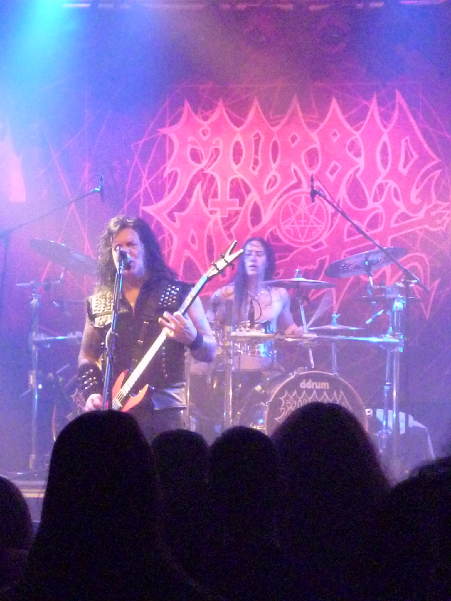 Morbid Angel live in der Garage Saarbrücken